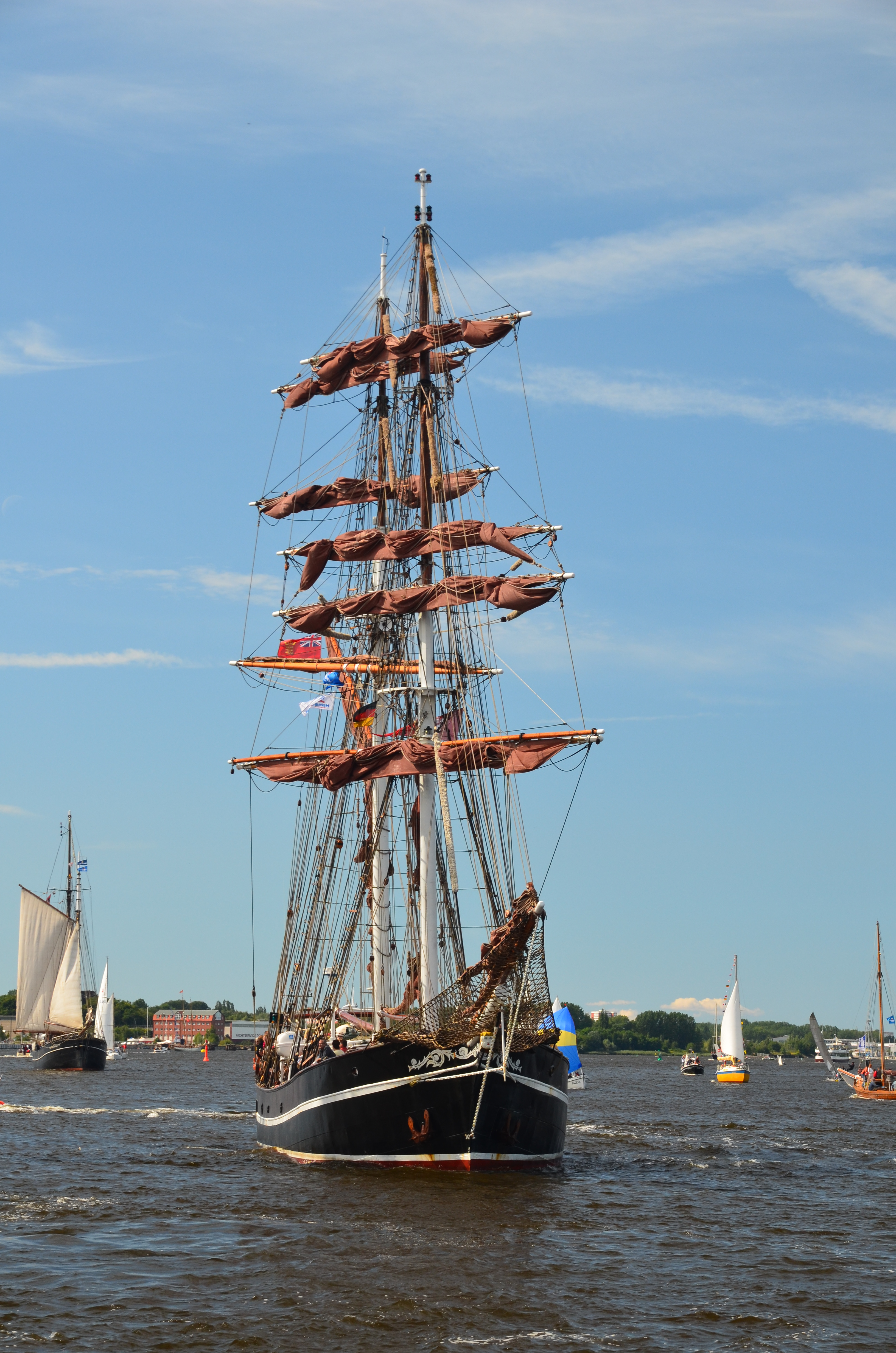 Impressionen von der 22. Hansesail 2012